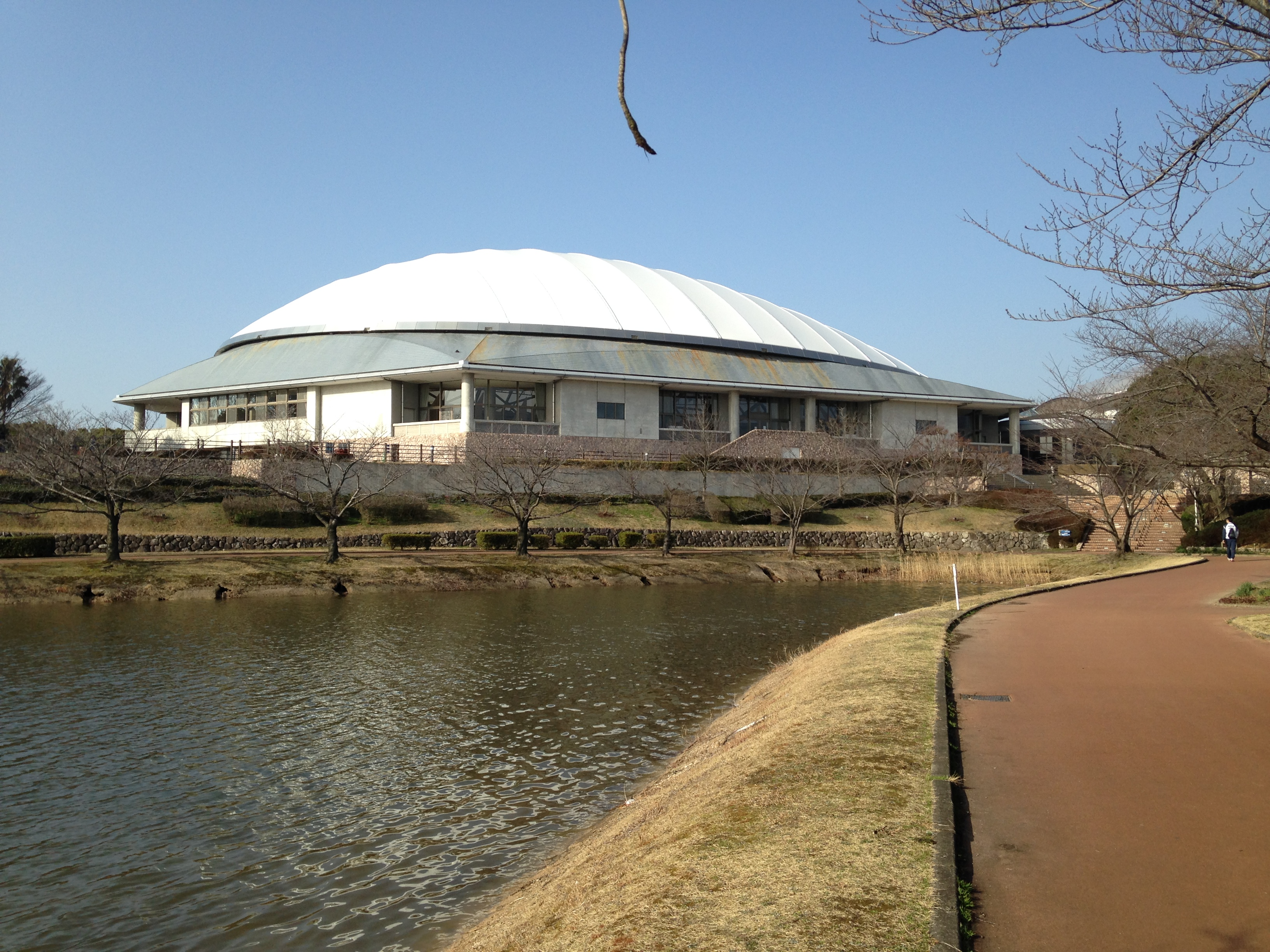 駕与丁池の畔より望むかすやドーム